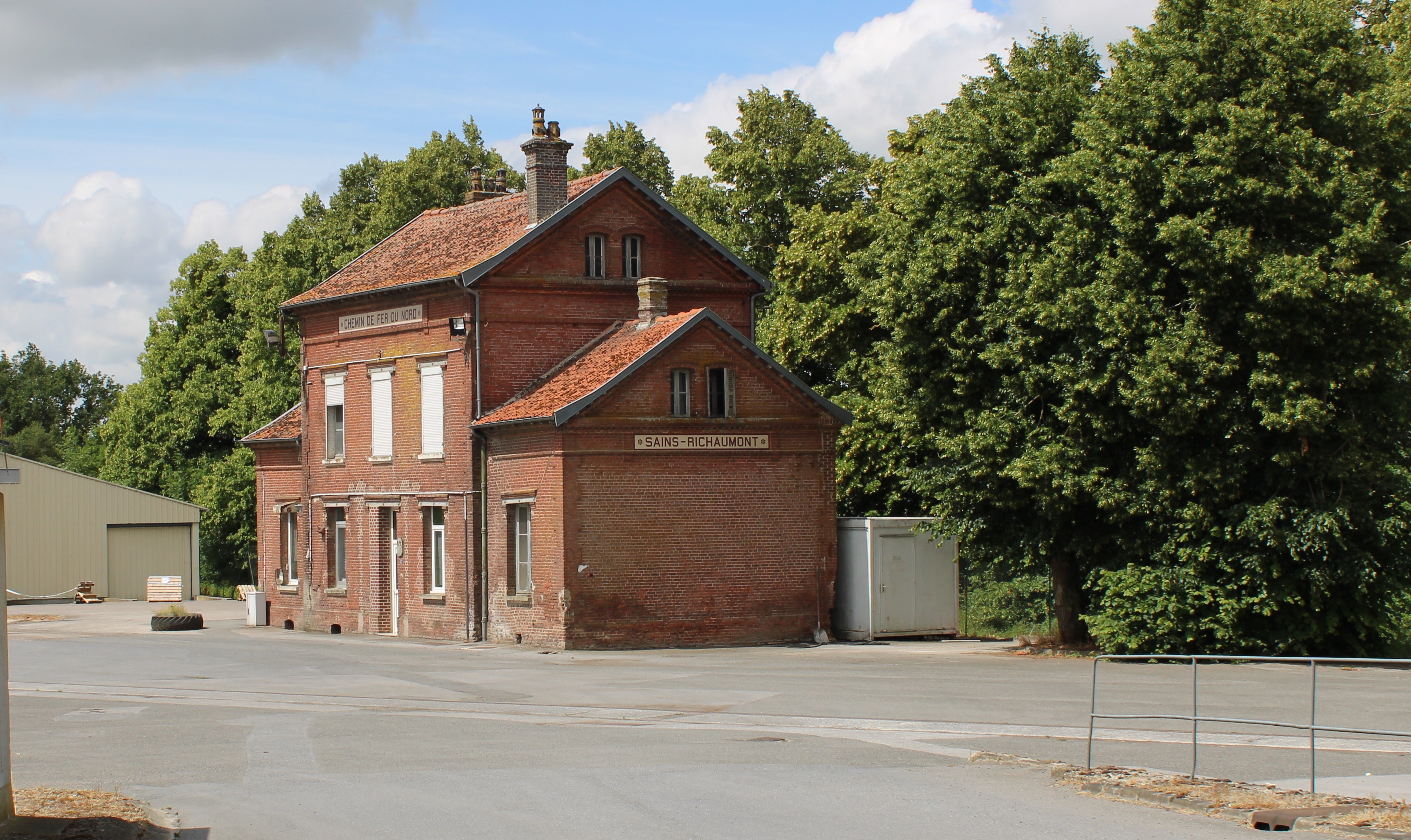 L'ancienne gare